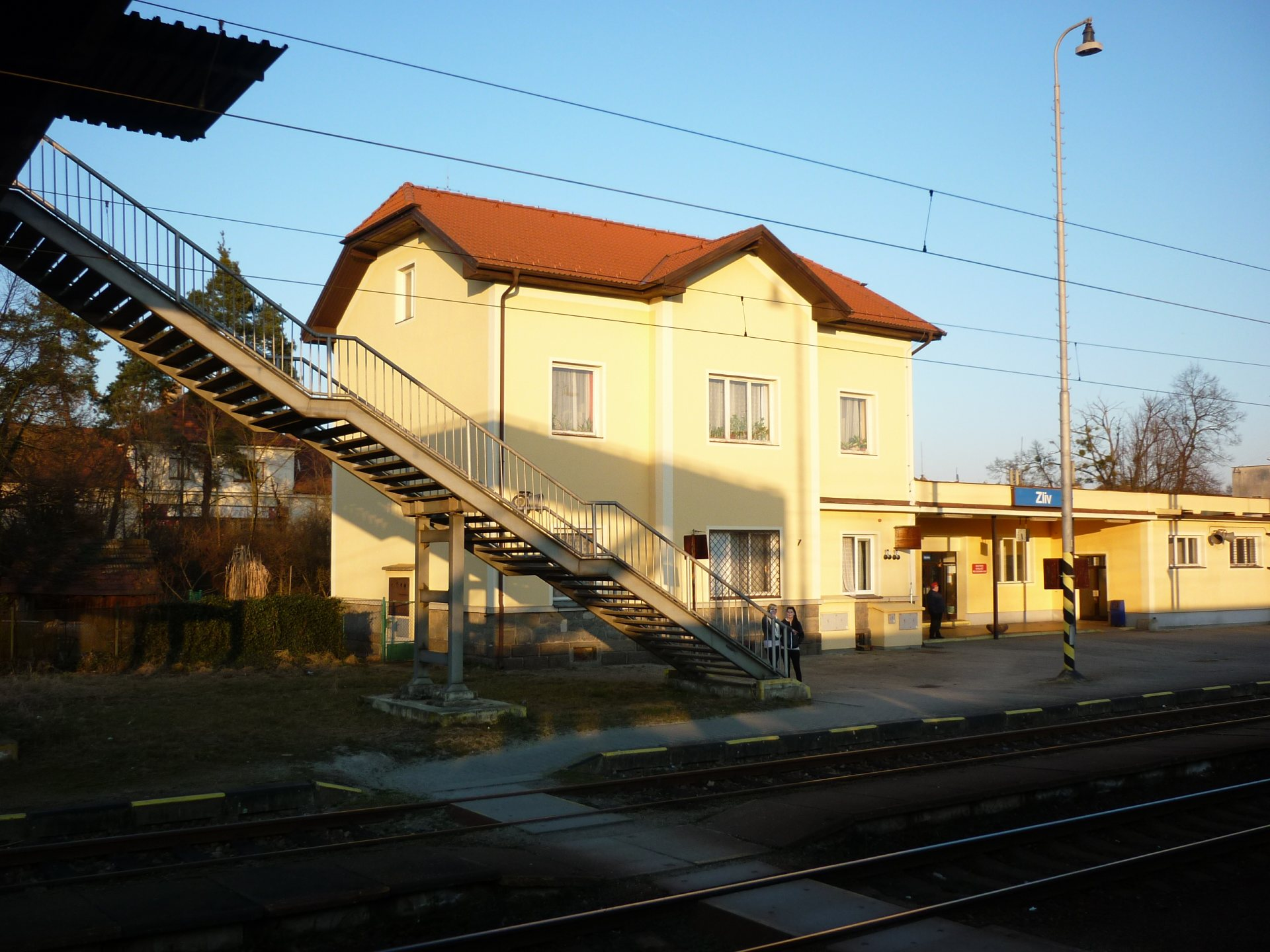 Zliv - železniční stanice